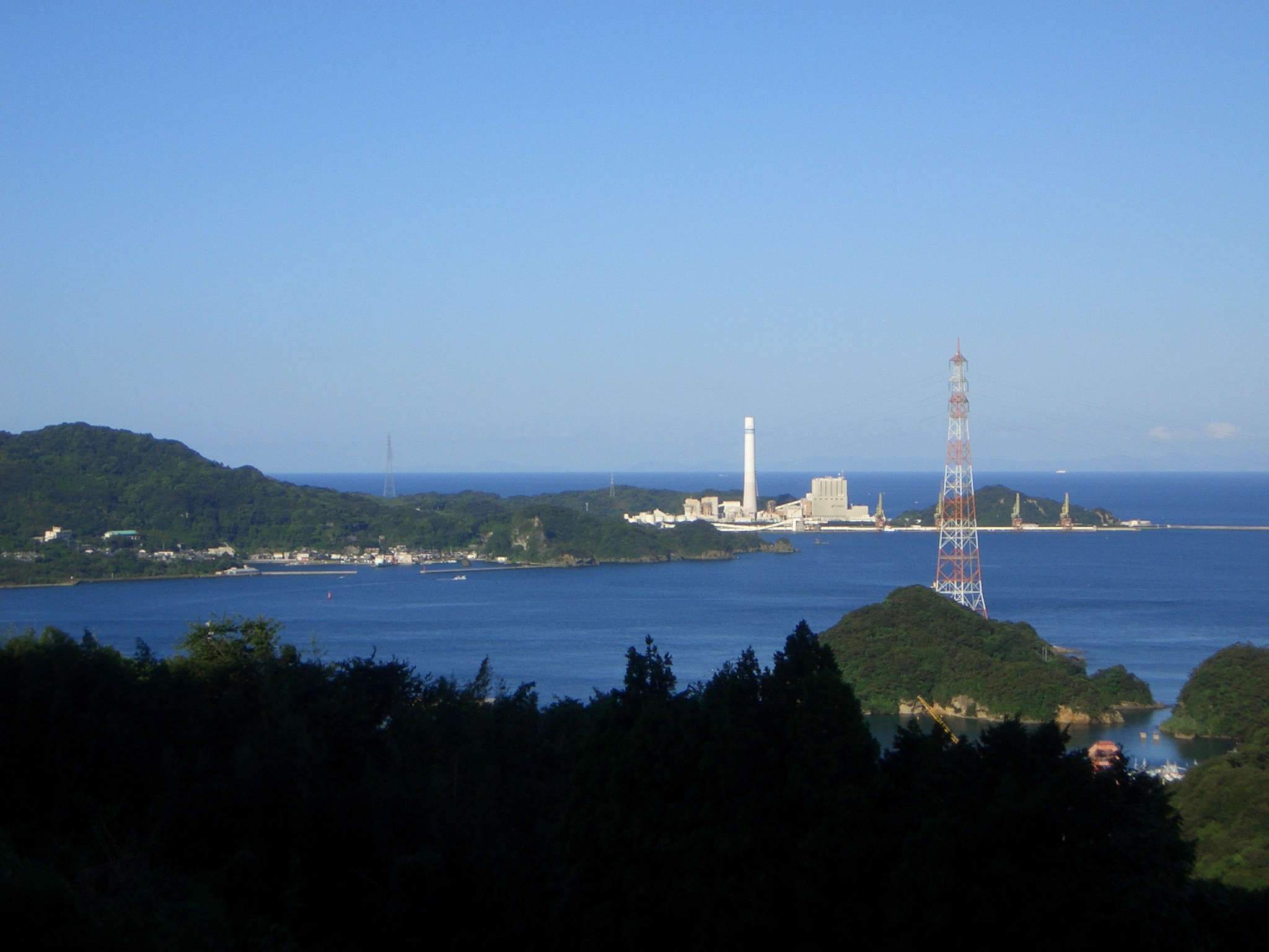 電源開発株式会社松島火力発電所の遠景（大瀬戸町より撮影）